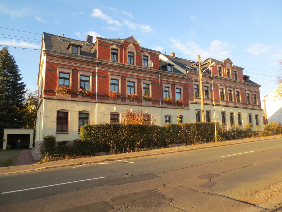 Wohnhaus/Häuser